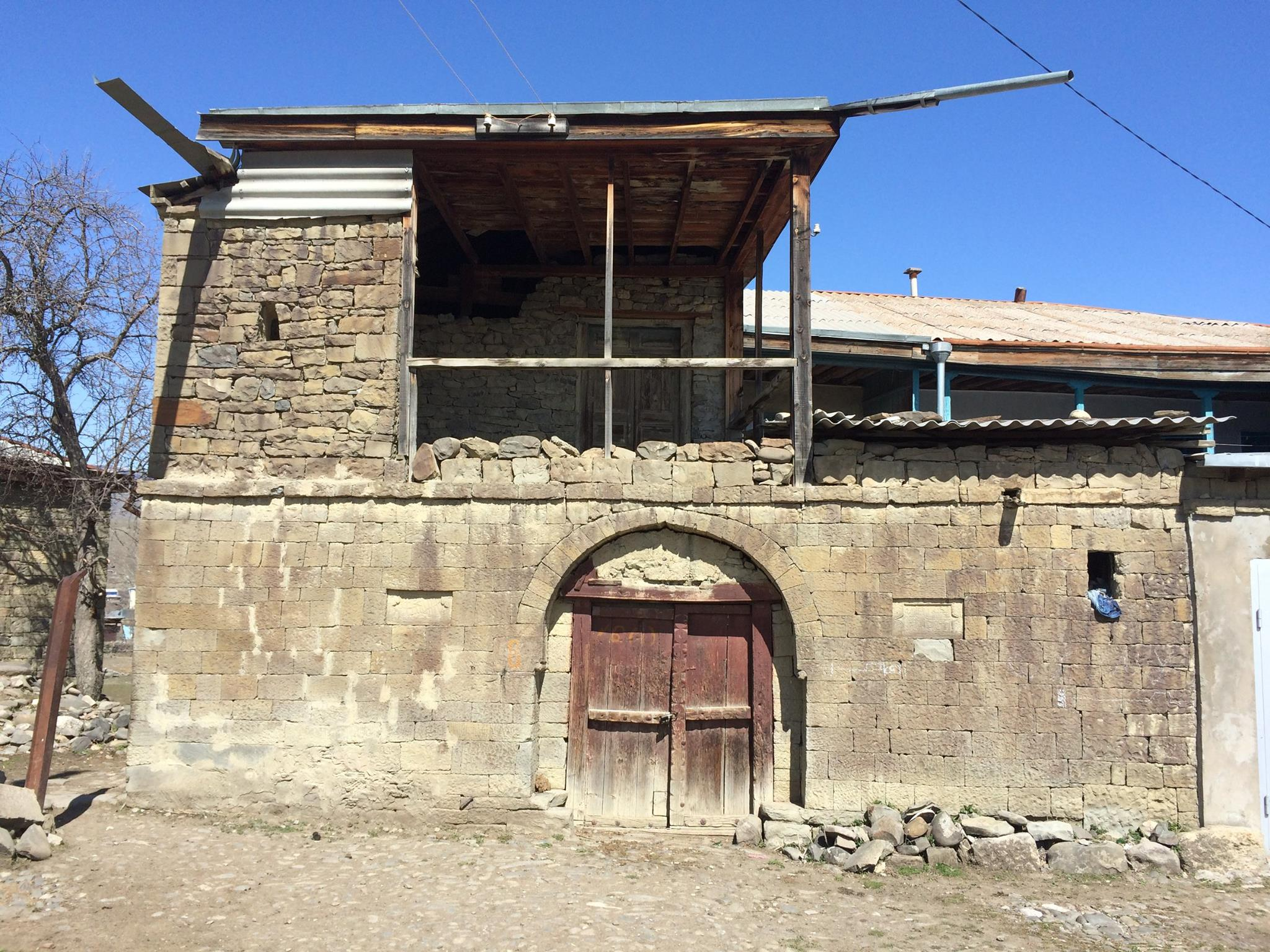 Лакский район, с. Хури